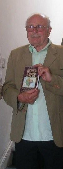 Edward Hardwicke in 2008.